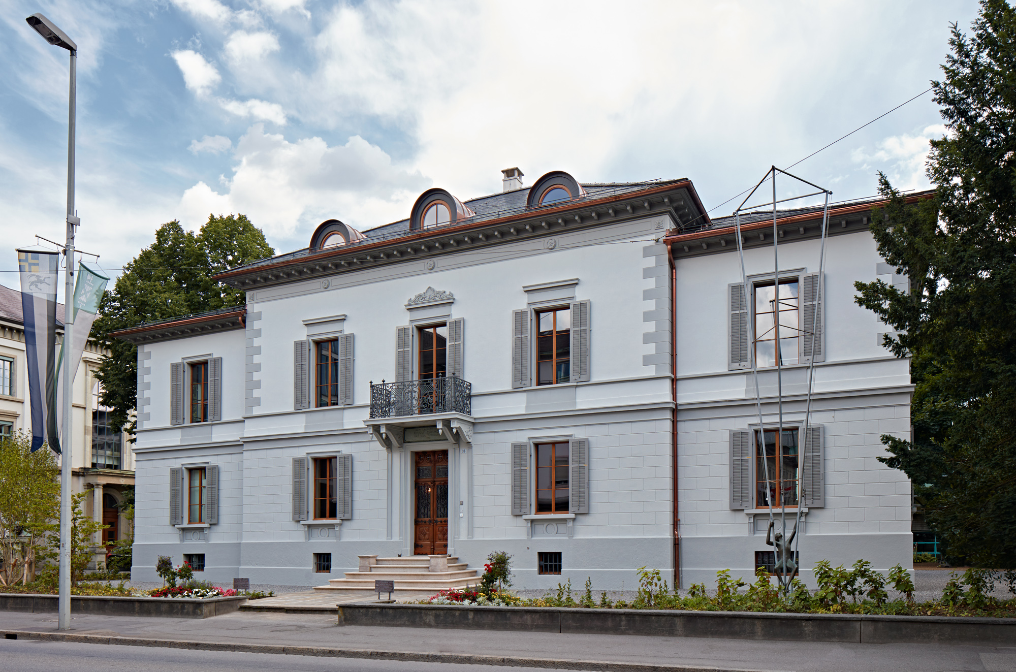 Zurlindenvilla - Geschäftsstelle des STV in Aarau